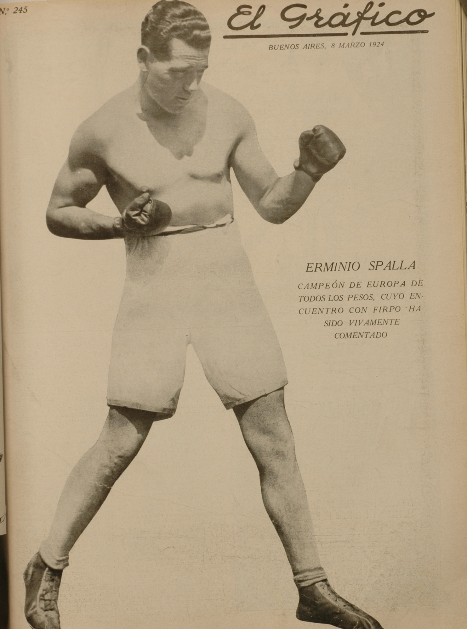 El Grafico del 08 de Marzo de 1924. Edicion 245